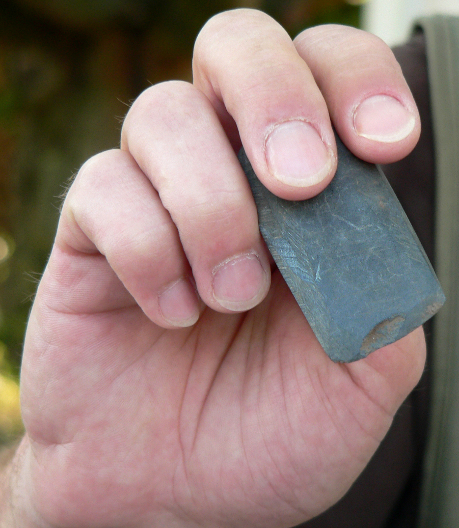 Dechselklinge als Fundstück der Siedlung Rosdorf Mühlengrund